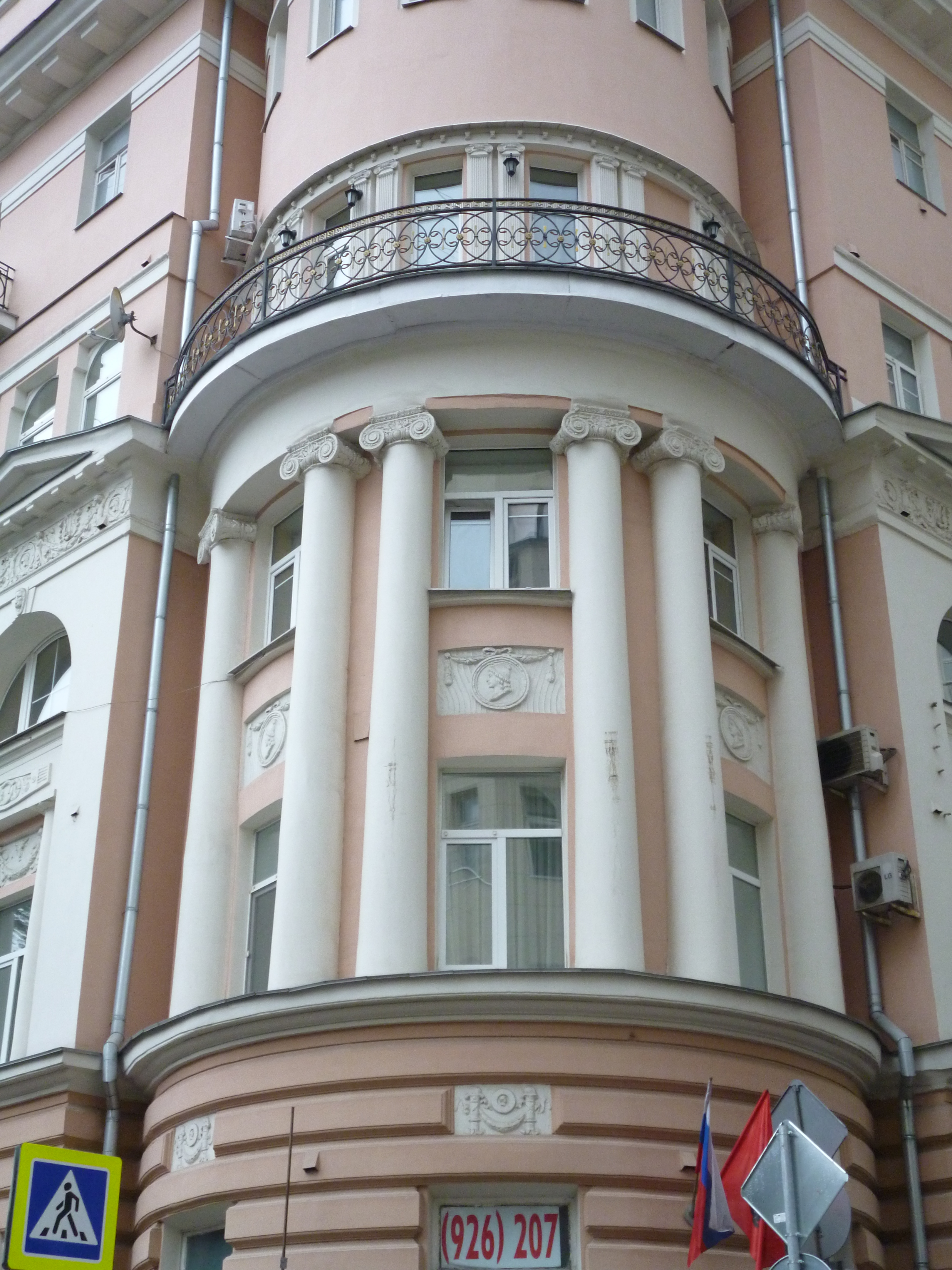 Доходный дом А.Д.Сидамон-Эристова: Бронная М. ул., дом 31/13, Пресненский, Центральный округ, Москва